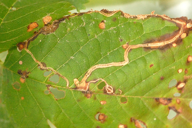 Stigmella aurella from Commanster, Belgian High Ardennes .